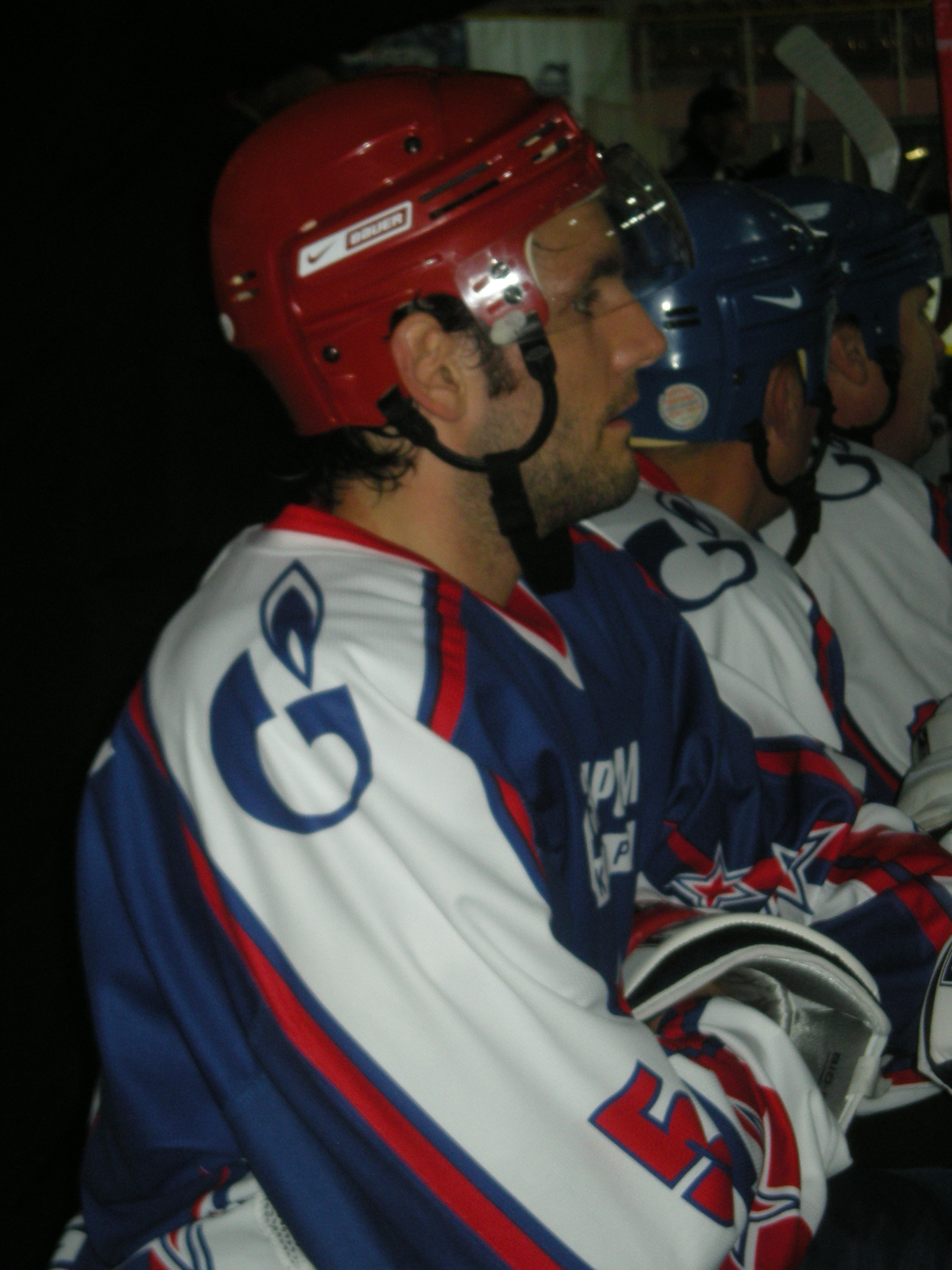 Раймон Жиру